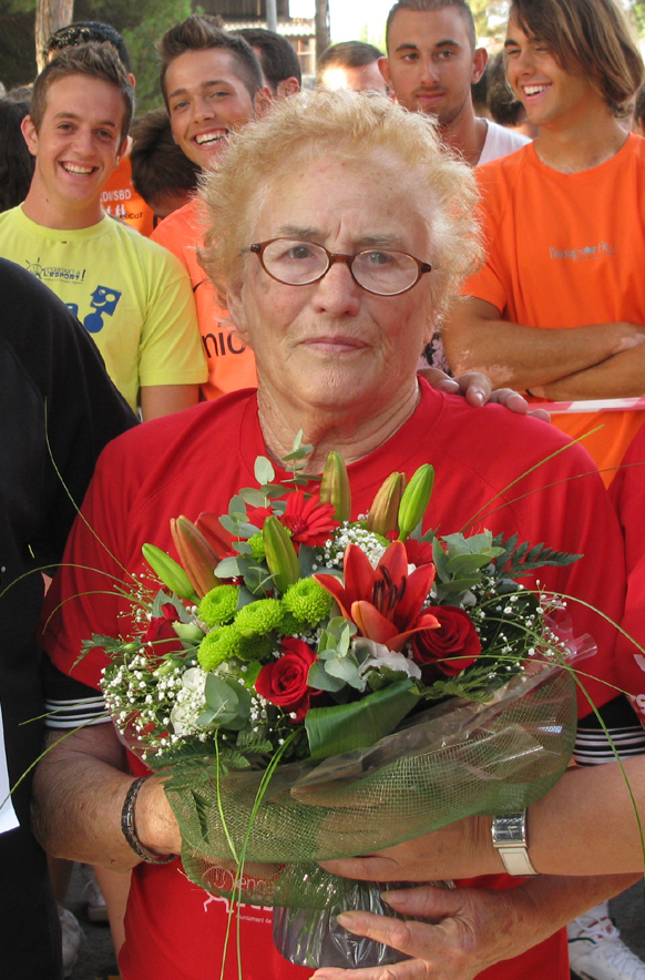 La gran atleta Maria Victor tal com es avui en dia (2011)